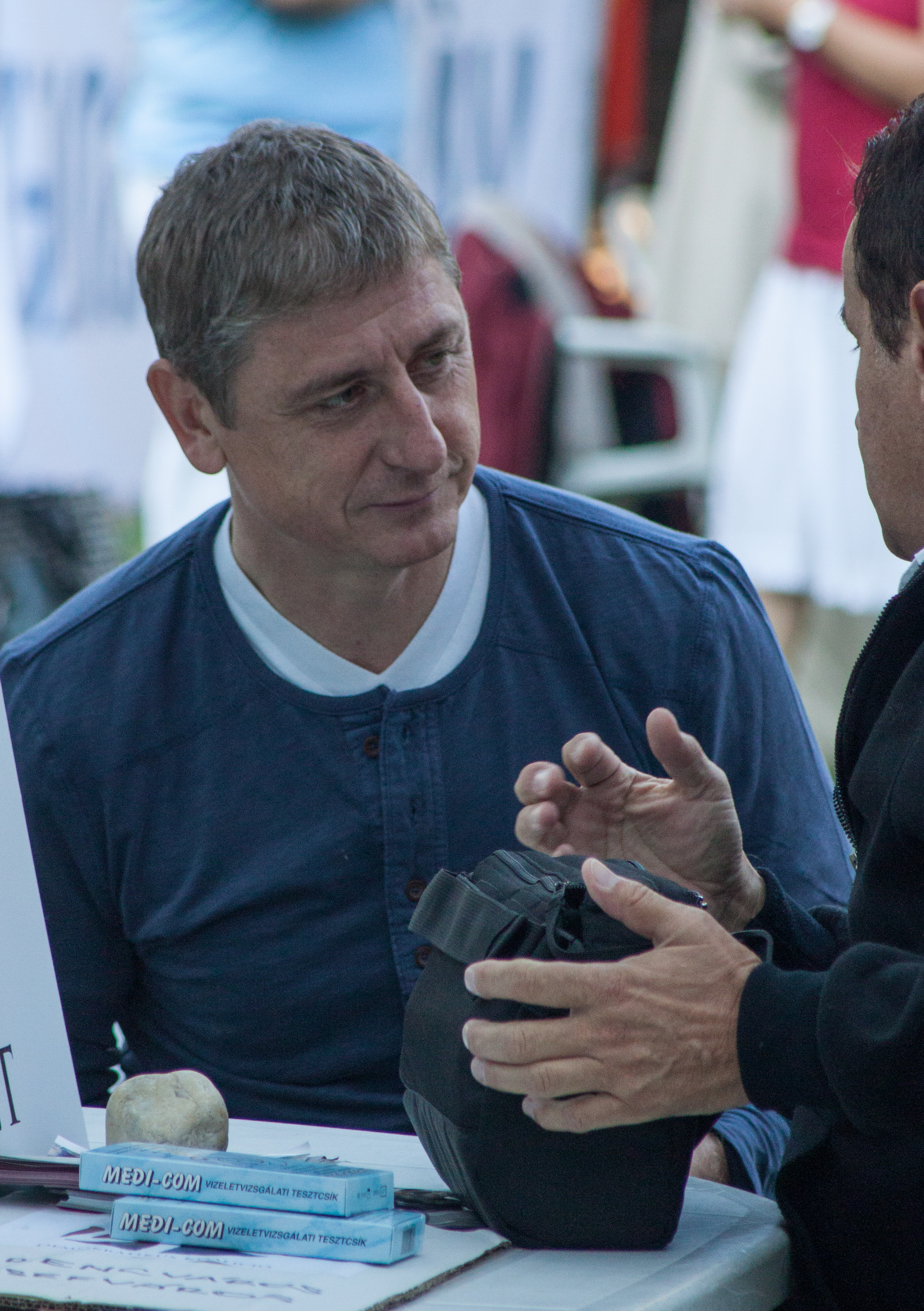 Gyurcsány Ferenc és társai éhségsztrájkja a választási jogok korlátozása ellen